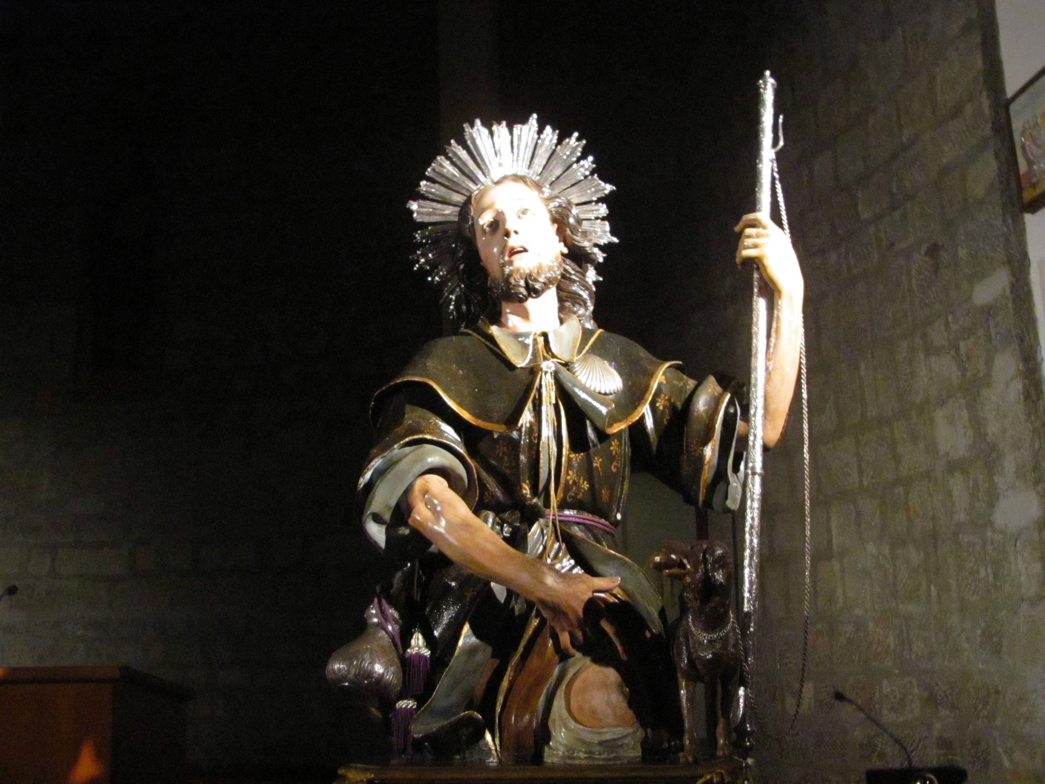 Statua di San Rocco venerata a Satriano di Lucania